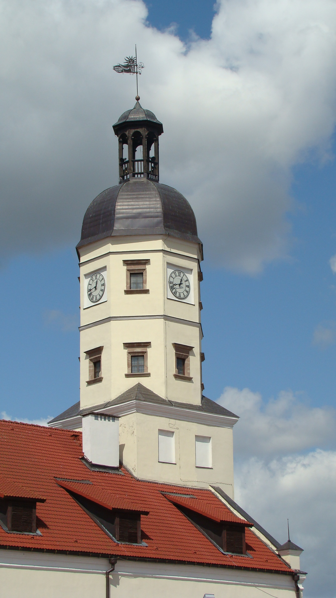 Беларуская (тарашкевіца): Гарадзкая ратуша з гандлёвымі радамі. г. Нясьвіж This is a photo of Belarusian heritage monument. Reference number: 611Г000474 ( WLM)